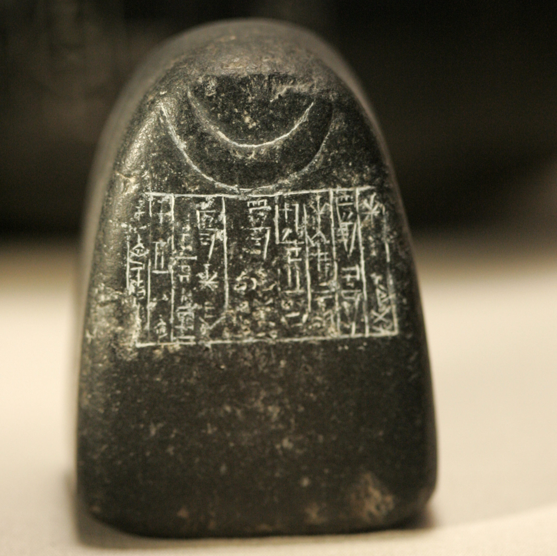 ArtistUnknownDescription Poids utilisé dans le grand temple du dieu-lune à Ur et voué par le roi Shulgi. Début du XXIe siècle avant J.-C. Diorite Current location (Inventory)Louvre Museum Native nameMusée du LouvreLocationParisCoordinates48° 51′ 37″ N, 2° 20′ 15″ E Established1793Website control : Q19675 VIAF: 257711507 ISNI: 0000 0001 2260 177X ULAN: 500125189 LCCN: n80020283 NLA: 35912436 WorldCat Room 2Accession numberAO 22187 ReferencesLouvre.frSource/PhotographerRama Poids utilisé dans le grand temple du dieu-lune à Ur et voué par le roi Shulgi. Début du XXIe siècle avant J.-C. Diorite